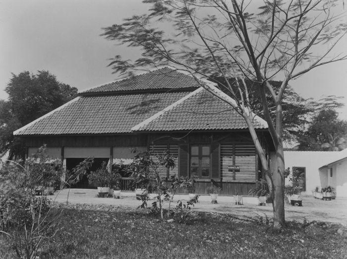 foto. Het woonhuis van een plantagemedewerker te Proepoek